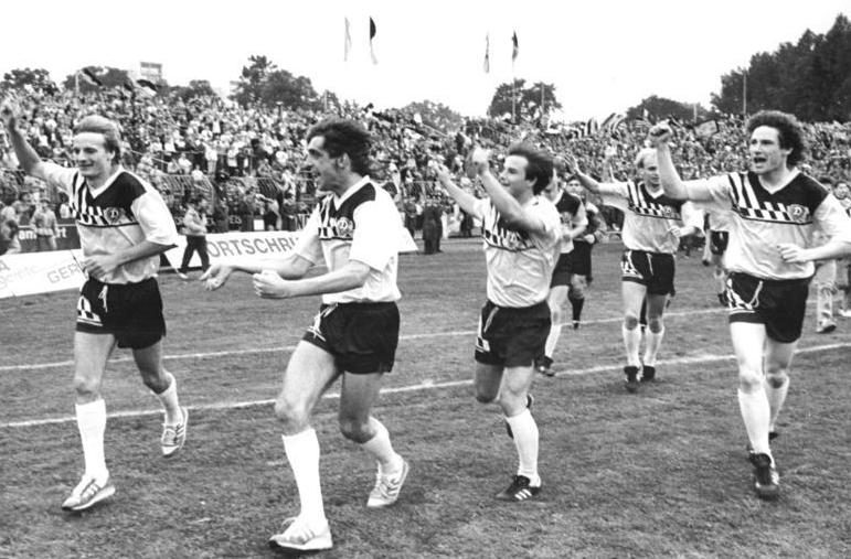 ADN-ZB-Häßler- -3-6-89-ba-Dresden: Fußball-Oberliga- Den Dank der Dynamos hatte sich das Dresdner Publikum verdient. Andreas Trautmann, Ralf Minge, Jörg Stübner und Frank Lieberam (v.r.n.l.) winken während der Meisterfeier nach dem 5:0 über den 1. FC Union Berlin ihrem treuen Anhang - es waren 27 000 Zuschauer zum Saisonausklang gekommen.